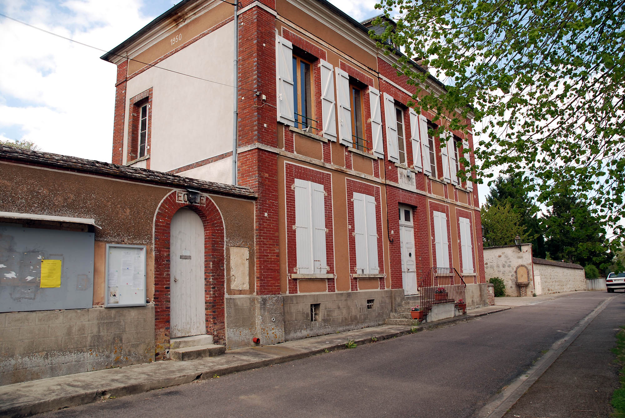 Ancienne mairie et école de Bagneaux (Yonne France)